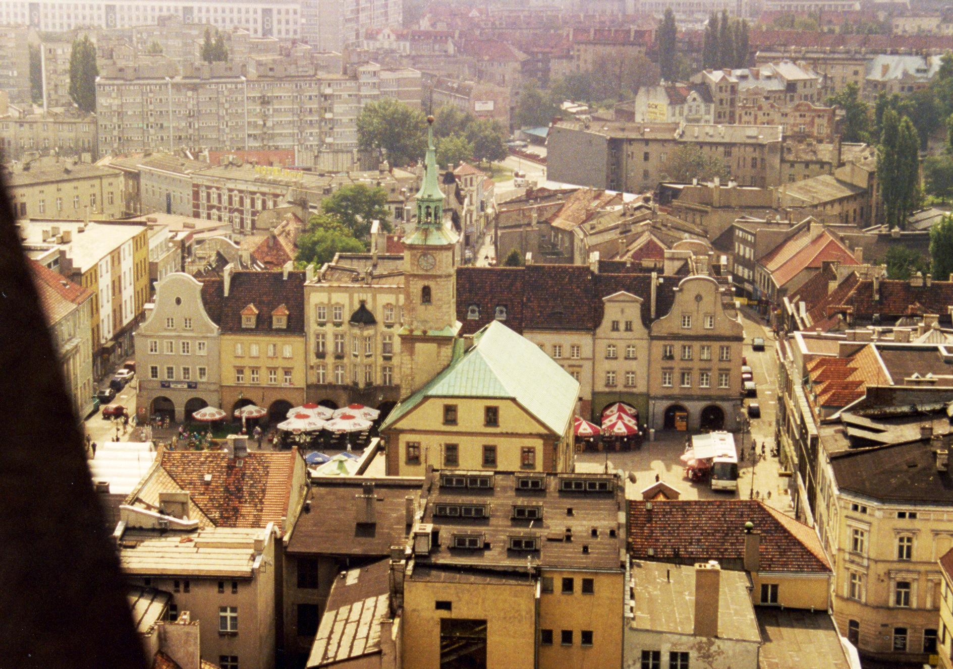 Gliwice, nad dachami Starego Miasta - Rynek z ratuszem.